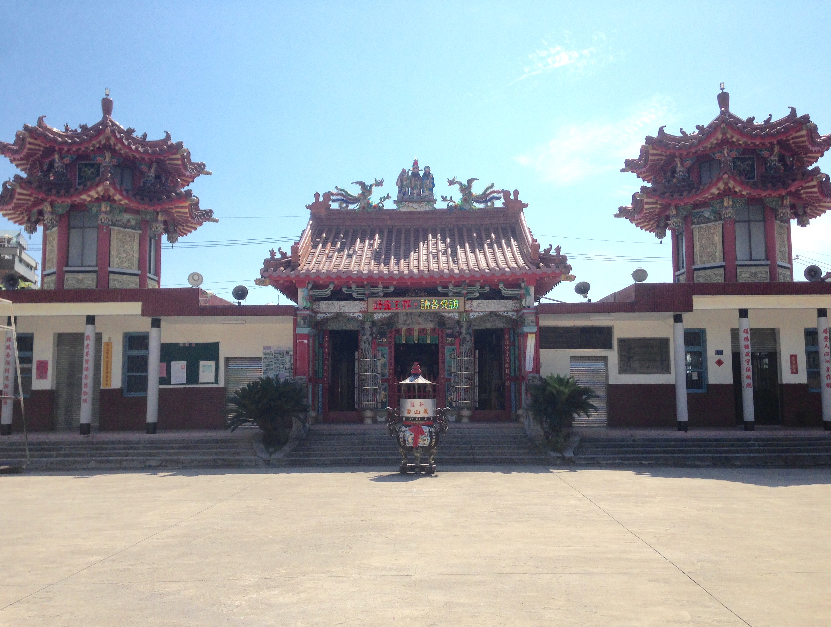 中文（台灣）: 新莊義山宮